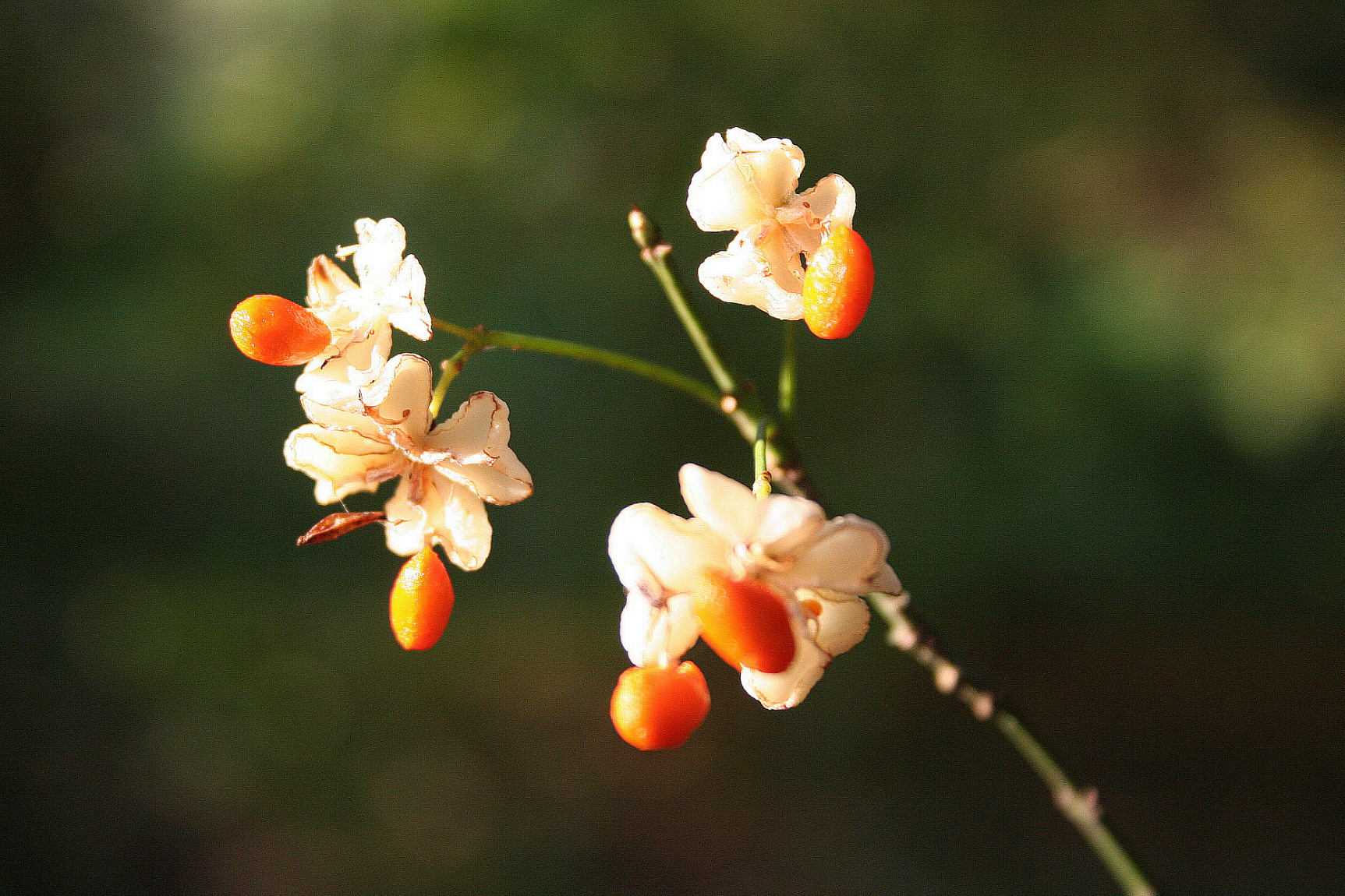 Fleurs du Fusain d'Europe (Euonymus europaeus) f. albus